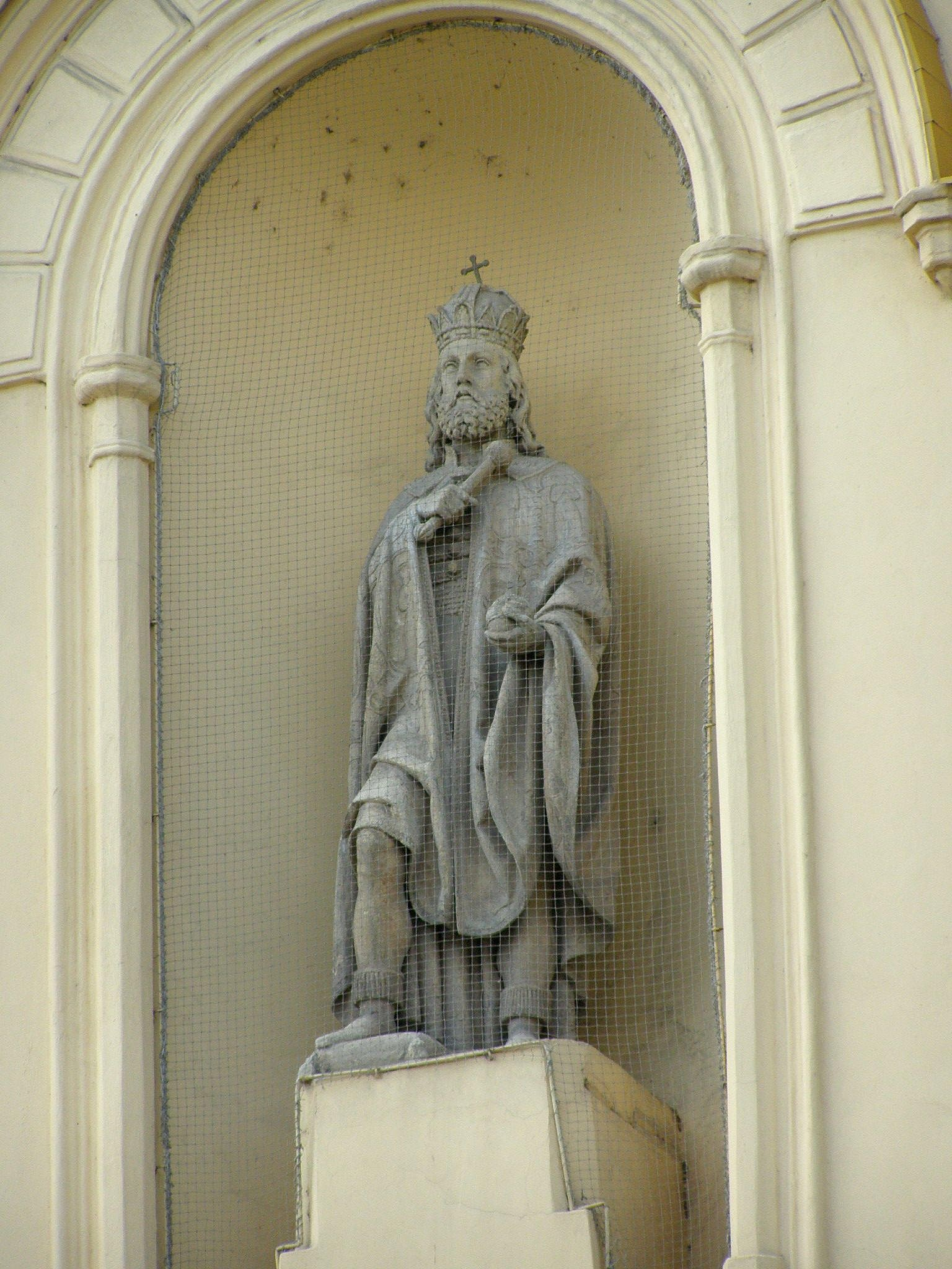 Socha patróna - sv. Štefana - v nike nad vchodom do kostola sv. Štefana v Bratislave